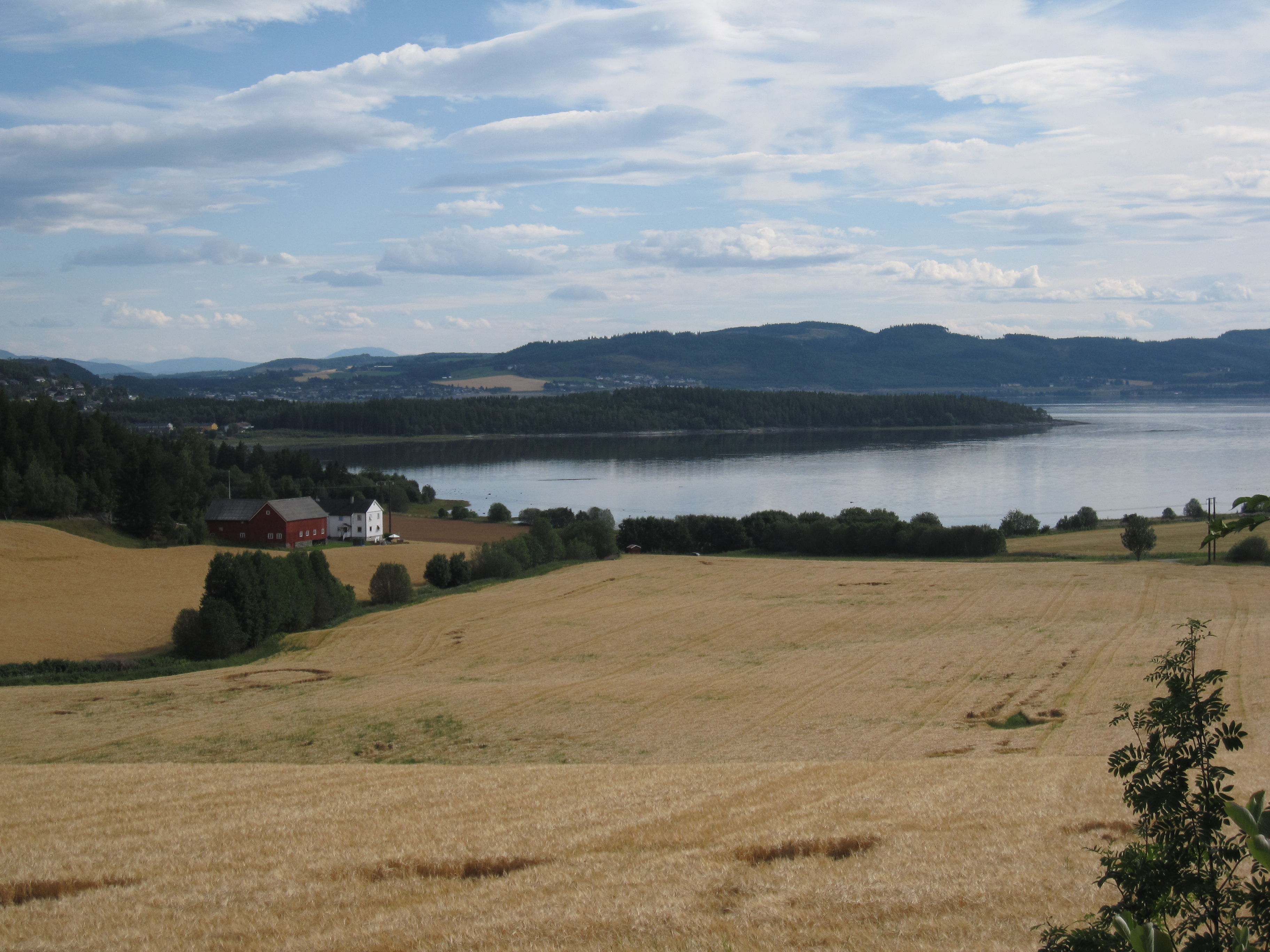 utsikt frå Overrein gard mot Beitstadfjorden